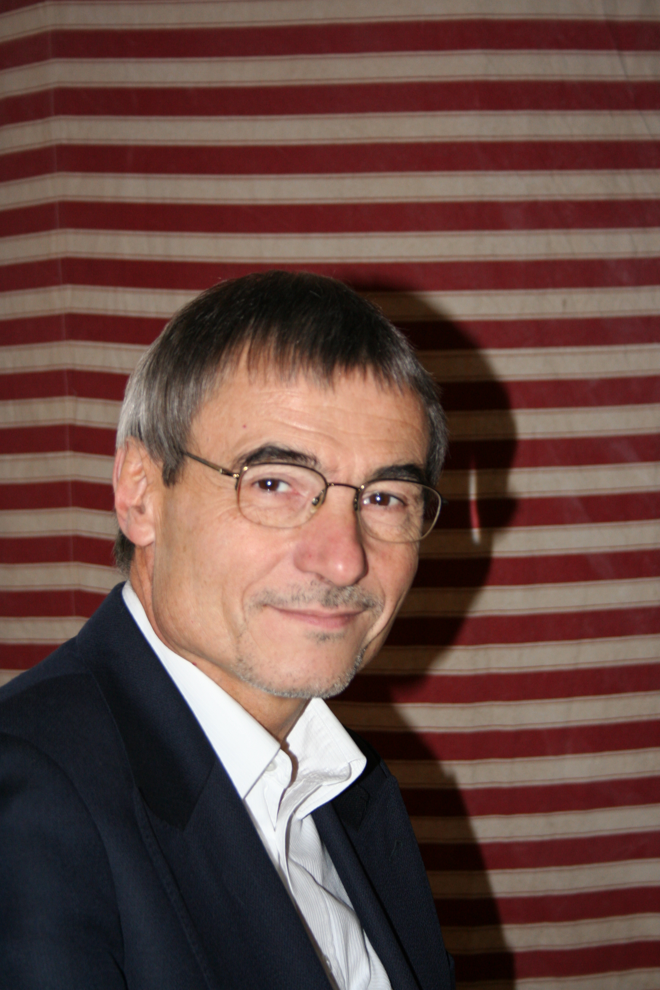 Auteur lors du 2° festival du Livre Gourmand, Trouville sur Mer - France, Novembre 2008 Personality rights warningAlthough this work is freely licensed or in the public domain, the person(s) shown may have rights that legally restrict certain re-uses unless those depicted consent to such uses. In these cases, a model release or other evidence of consent could protect you from infringement claims.